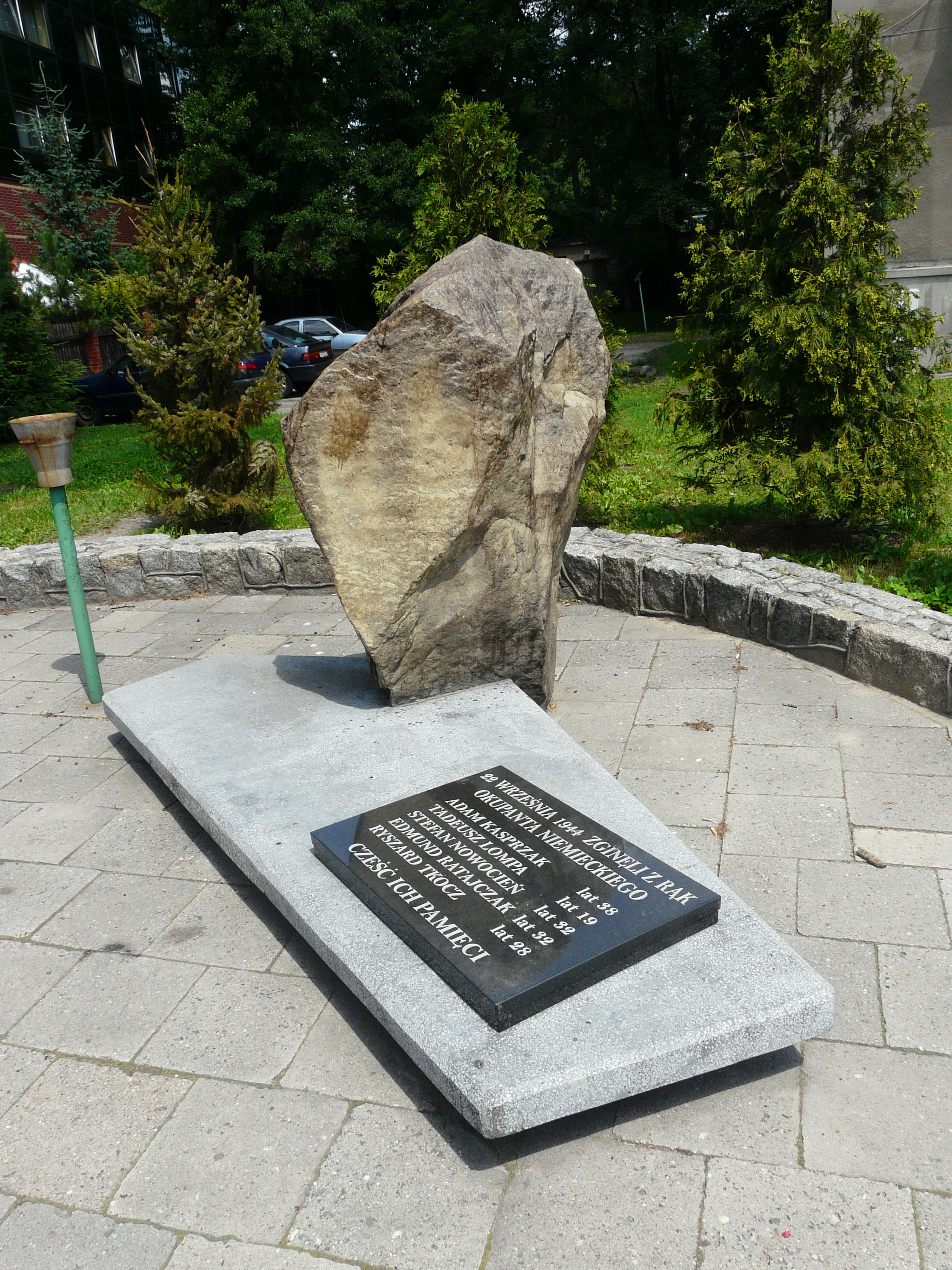 Tychy